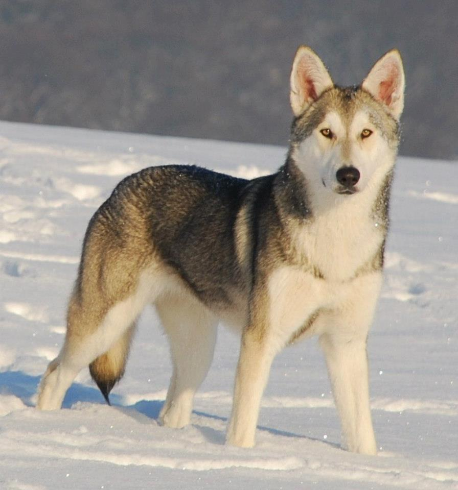 Saarlooswolfhündin aus NVSWH-Linie